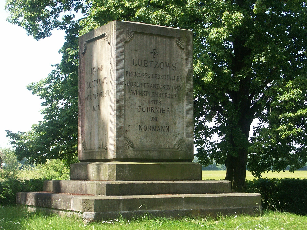 Das Lützow-Denkmal im Kitzener Ortsteil Klein-Schkorlopp